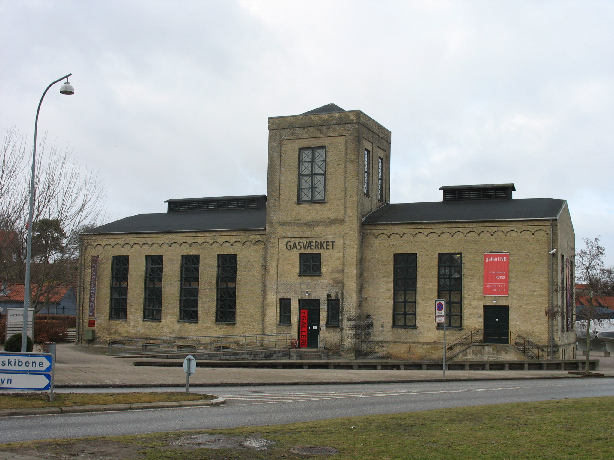 Roskilde Gasværk (Roskilde Gasworks) in Roskilde, Denmark